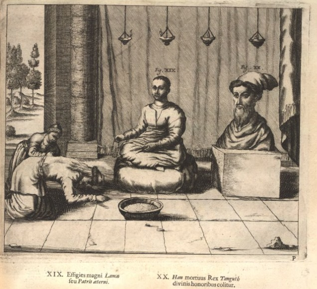 Gravure représentant le 5e Dalai Lama et le Khan mongol, Güshi Khan qui l'a mit au pouvoir au palais du Potala à Lhasa.